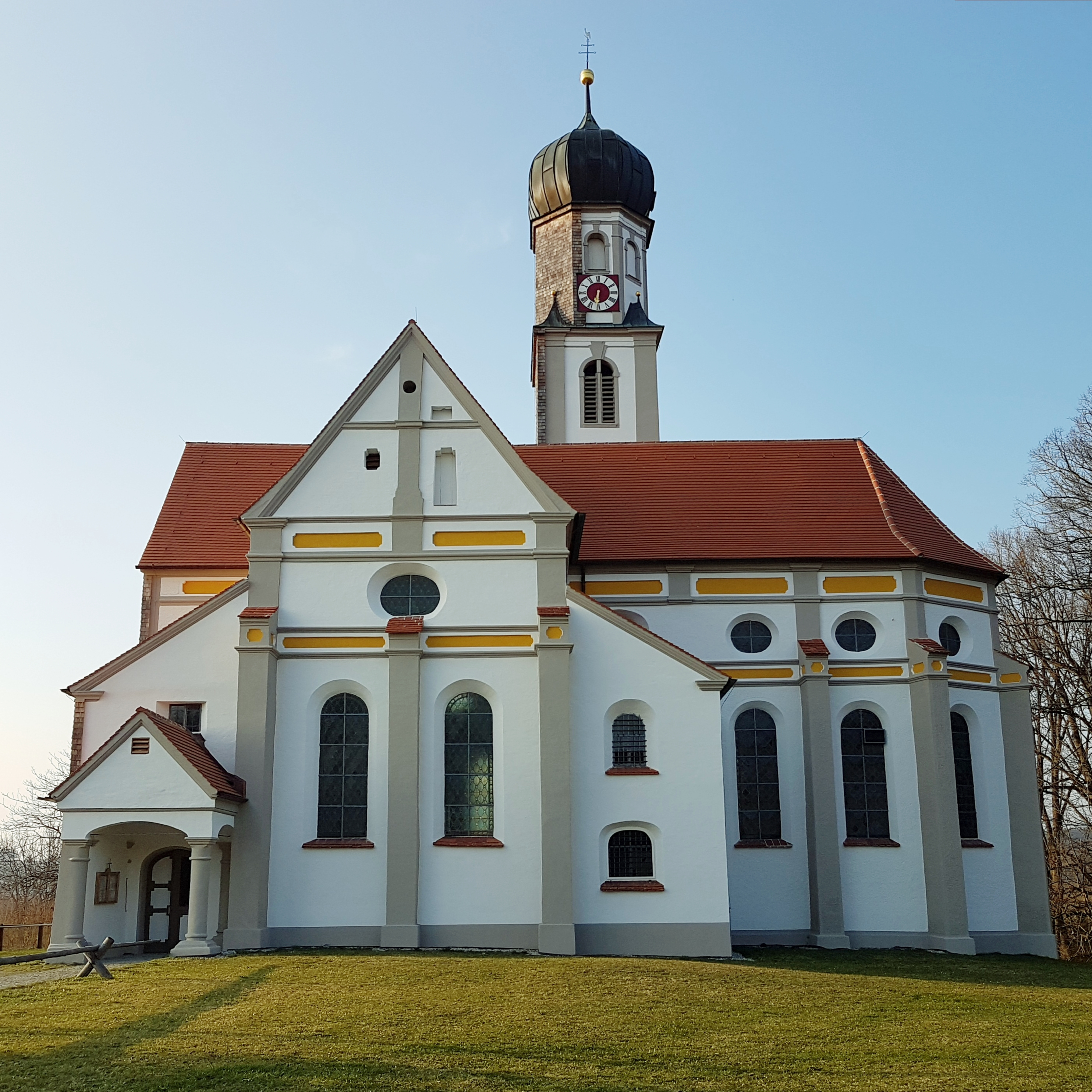 Hörmannshofen (Biessenhofen), Wallfahrtskirche St. Ottilia, Ansicht von Süden, frisch nach der gerade abgeschlossenen Außenrenovierung.